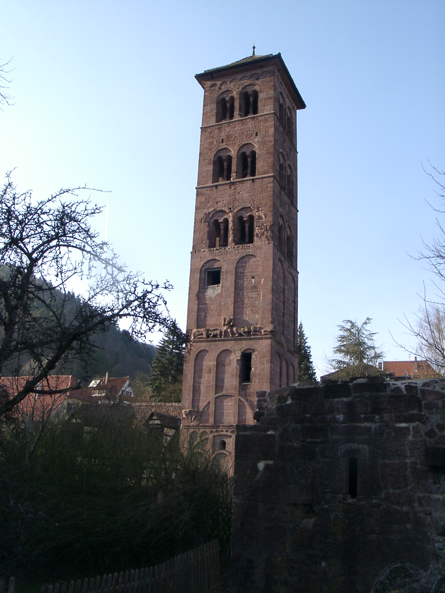 Kloster Hirsau, Eulenturm